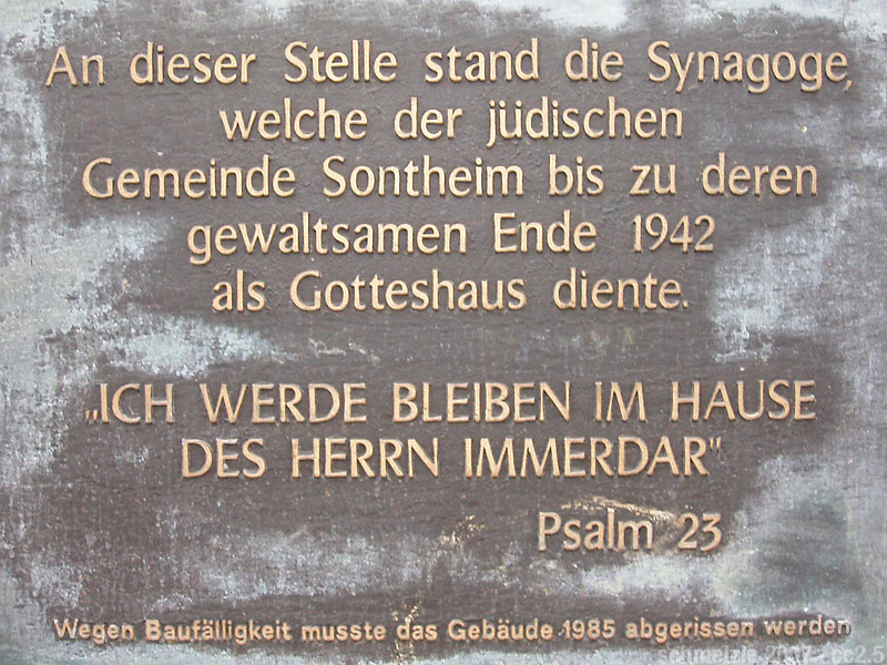 Synagogengedenktafel Heilbronn-Sontheim